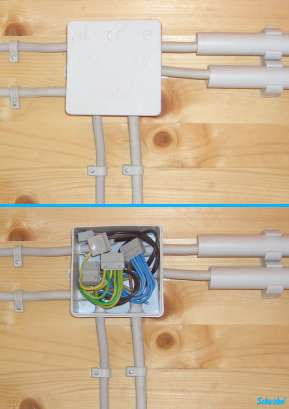 Abzeigdose in Aufputzausführung; oben geschlossen, unten geöffnet